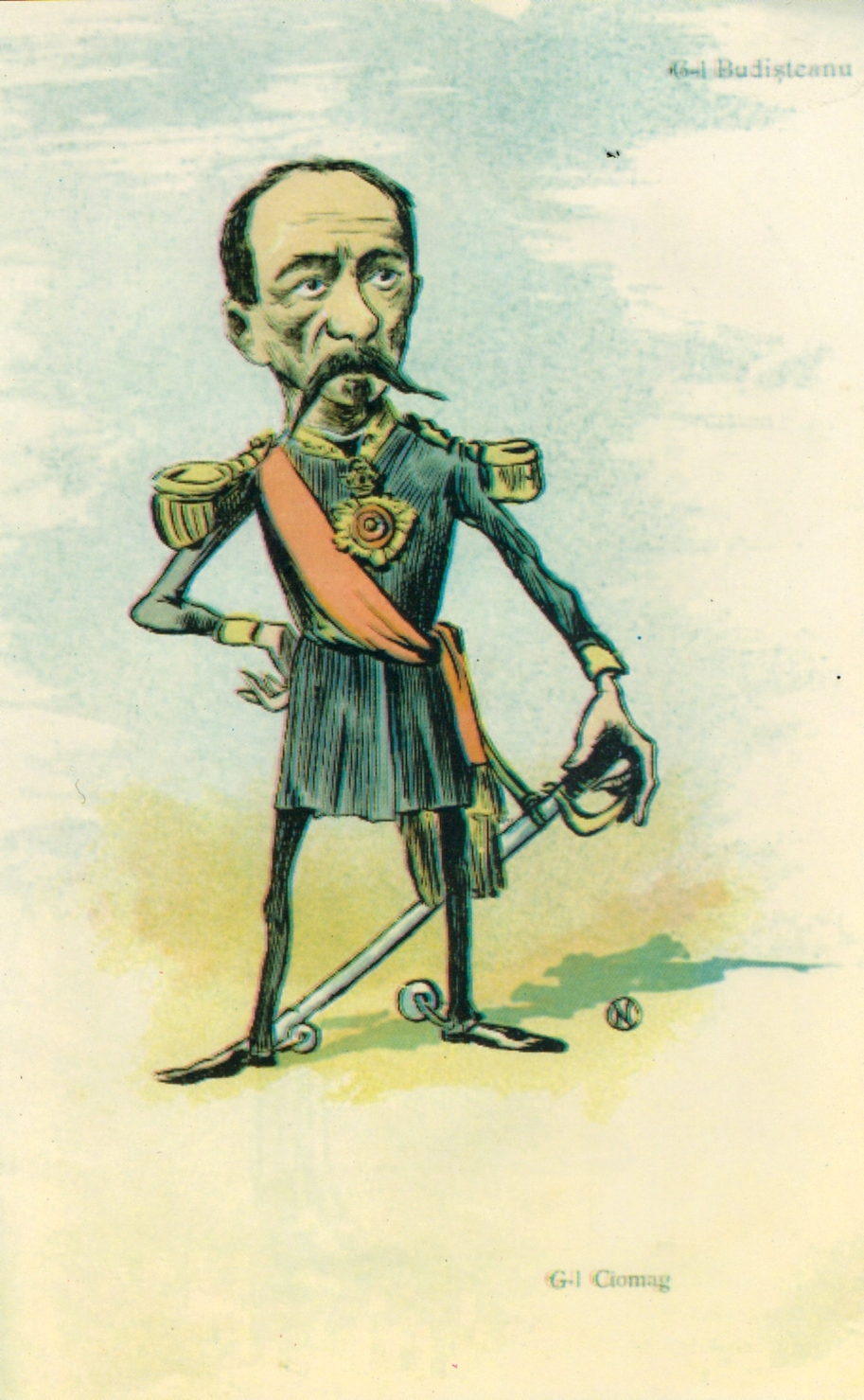 Constantin Budișteanu (caricatură din Albumul Contemporani). Generalul ciomug